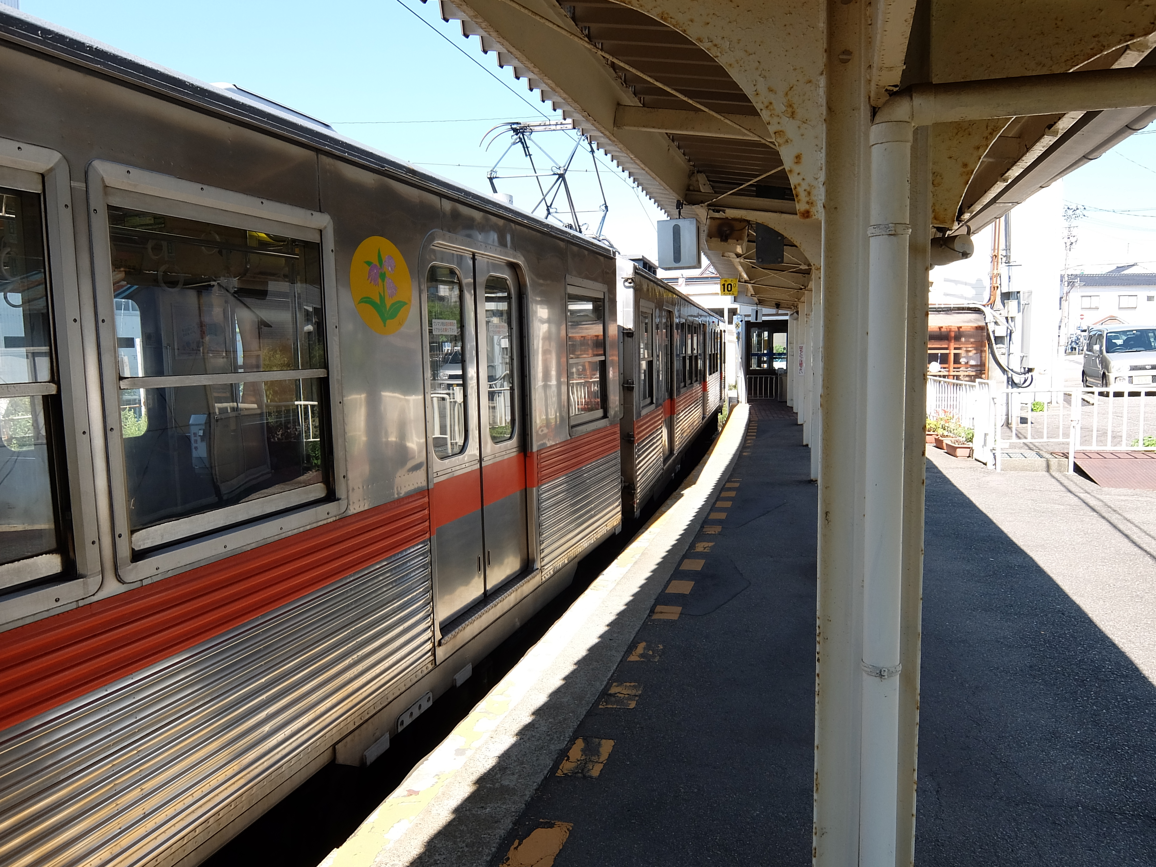 北陸鉄道 野町駅 2番線ホームと1番線に停車する列車